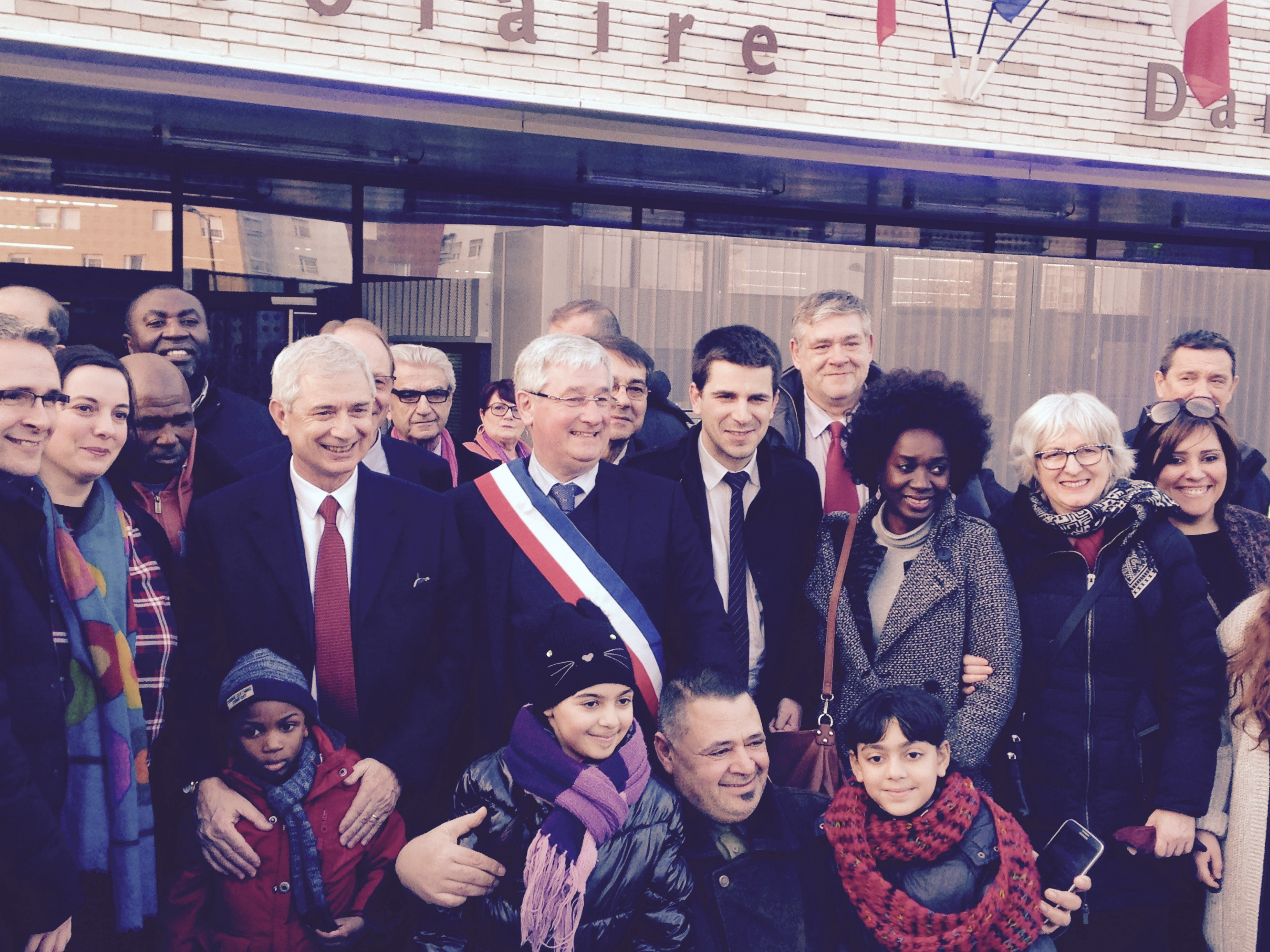 Elus et habitants lors de l'inauguration de l'école Danielle Mitterrand à Pierrefitte-sur-Seine. De gauche à droite : Stéphane Troussel, président du conseil général de Seine-Saint-Denis, Emmanuelle Cosse, vice-présidente du Conseil régional, Claude Bartolone, président de l'Assemblée nationale, Michel Fourcade, maire, Mathieu Hanotin, député, Christian Alloncius, conseiller municipal, Nadège Abomangoli, conseillère régionale, Brigitte Prospéri, conseillère municipale d'Epinay-sur-Seine, Sonia Bennacer, maire-adjointe, Christian Pernot, maire-adjoint.